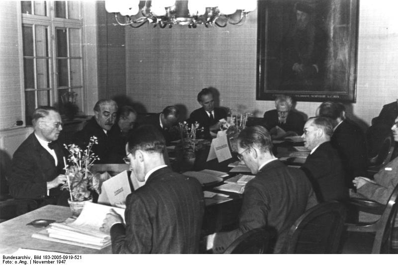 Ministerpräsidenten der Britischen Zone trafen sich in Flensburg. Die Ministerpräsidenten der Britischen Zone trafen sich vom 21-11- - 23-11-47 in Flensburg. Landwirtschafts- und Flüchtlingsfragen bildeten die Hauptthemen der internen Tagung. Unser Bild zeigt einen Blick auf die Flensburger Tagung. Links erkennt man den Ministerpräsidenten Hinrich Kopf (Niedersachsen), den Ministerpräsidenten von Schleswig-Holstein, Hermann Lüdemann, und rechts halbverdeckt den Ministerpräsidenten von Nordrhein-Westfalen, Karl Arnold. 24-11-47